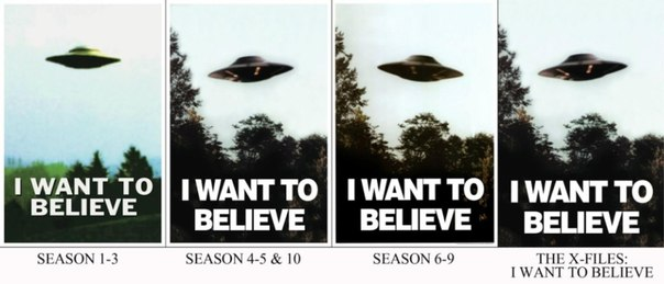 Постер "I Want To Believe"! Несколько его вариаций которые висели в кабинете агента Малдера!